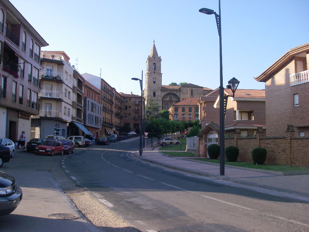 Vista parcial de Navarrete en la carretera de Entrena. Al fondo se observa la iglesia de la Asunción de María.